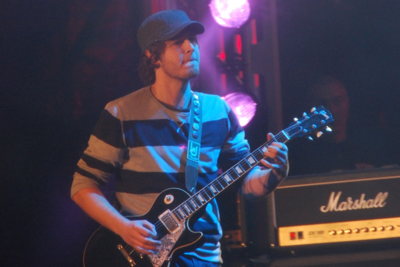 Michele Vicentini (Wice) dei Bastard Sons of Dioniso al concerto di X Factor a Trento.